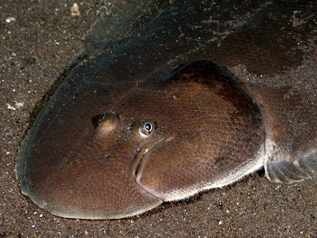 クロウシノシタ Paraplagusia joponica